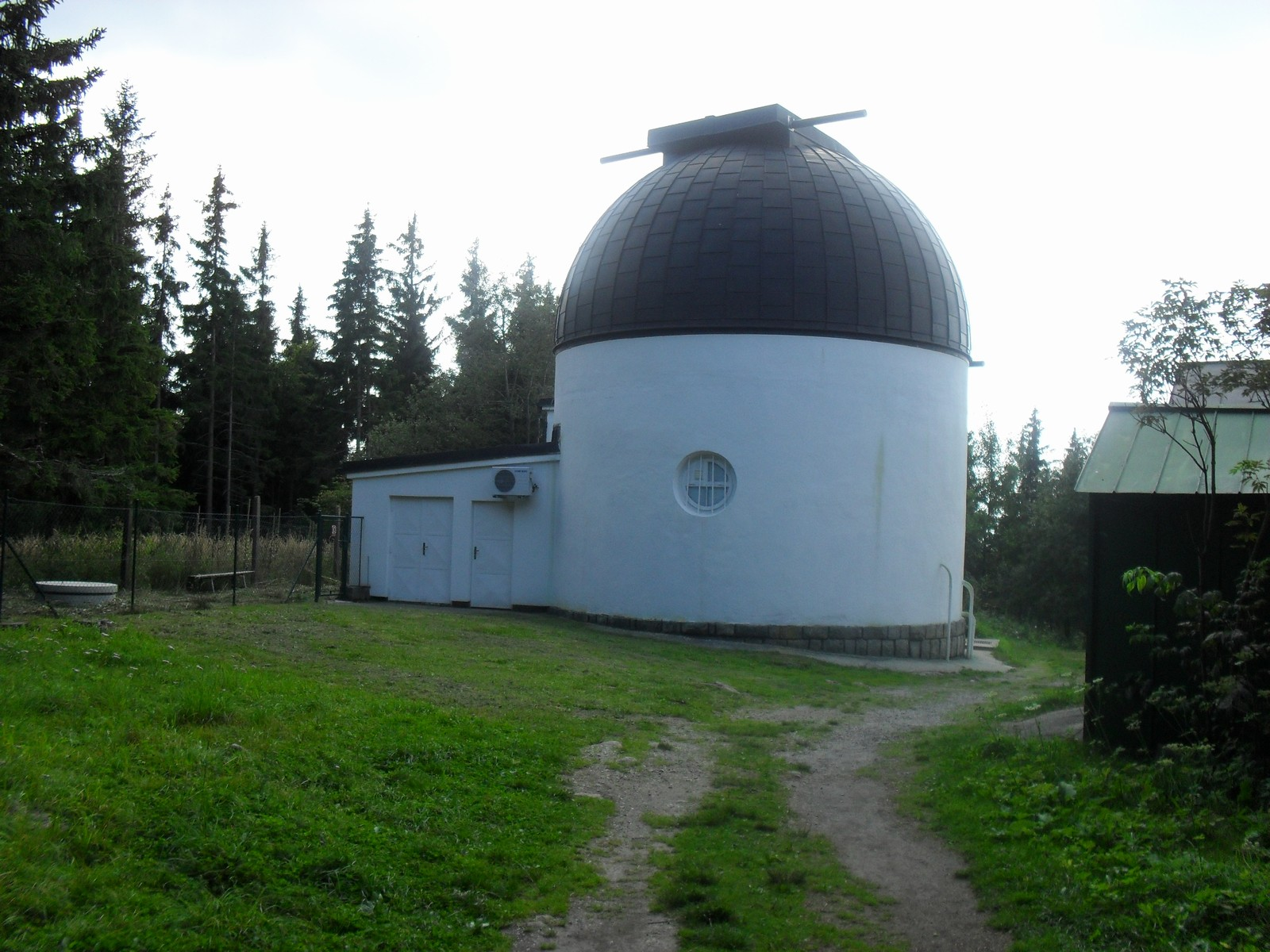 Fotky z mého výletu na Šumavskou Kleť